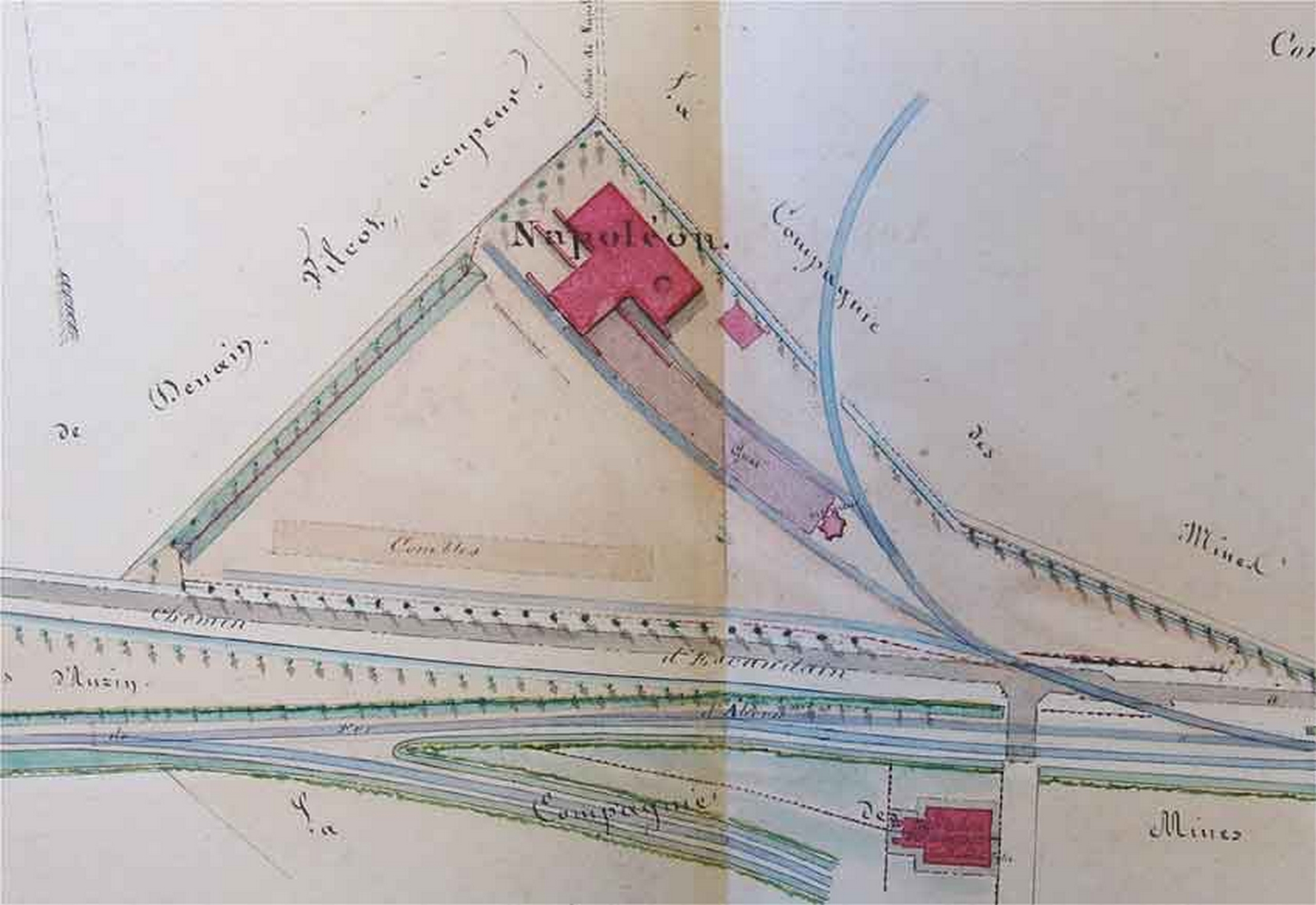 La fosse Napoléon de la Compagnie des mines d'Anzin était un charbonnage constitué d'un seul puits situé à Denain, Nord, Nord-Pas-de-Calais, France.